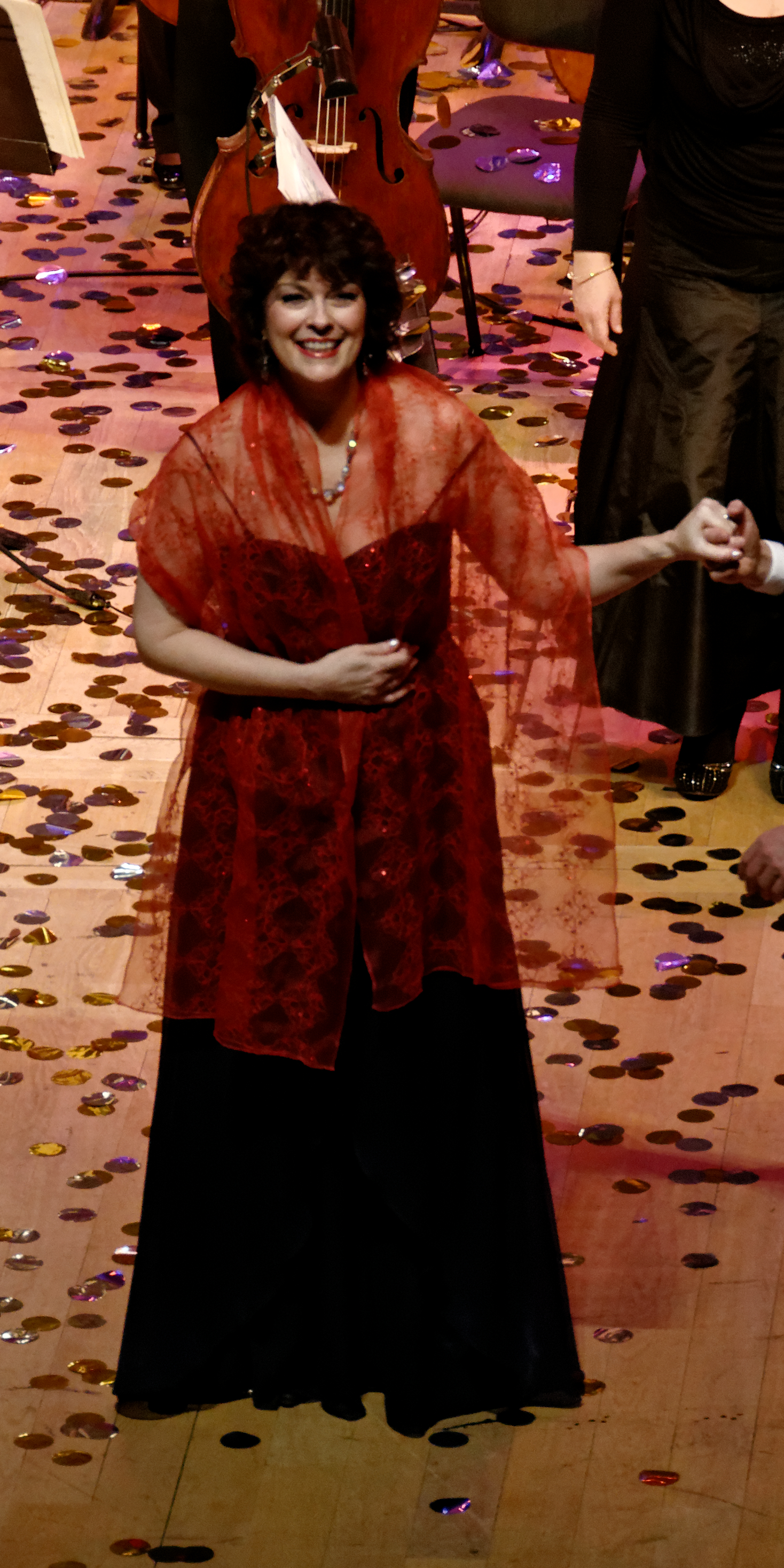 Jennifer Larmore. Concert de fin d'année 2013, Auditorium Maurice-Ravel, Lyon (France)